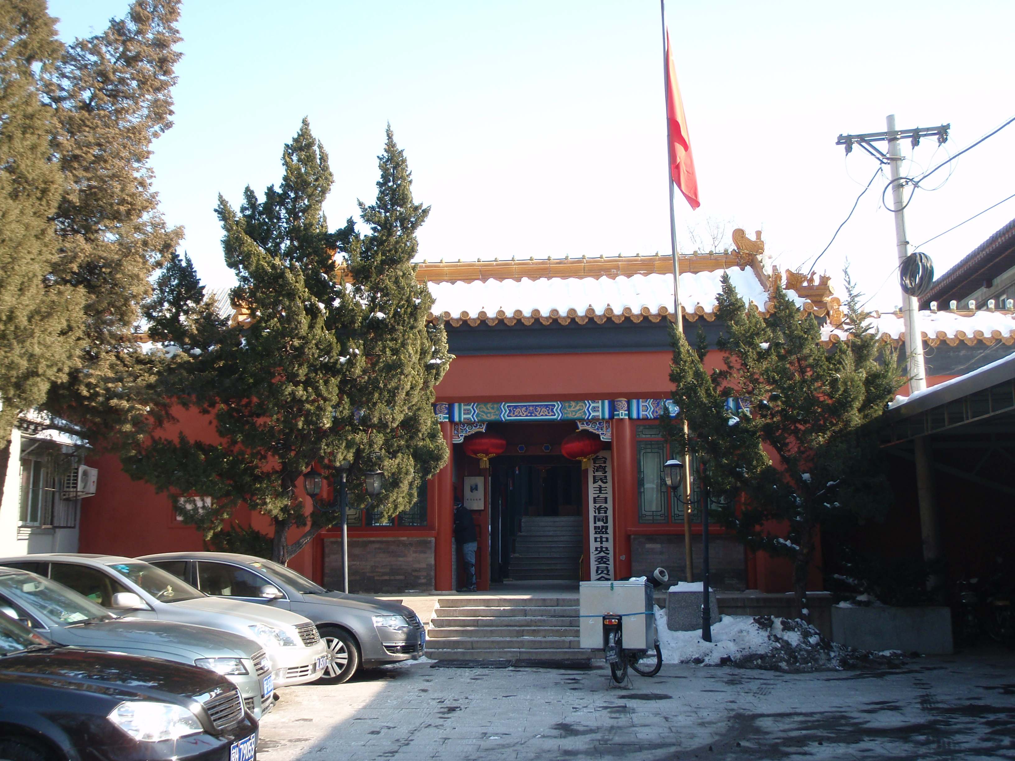 中文（中国大陆）: 台湾民主自治同盟中央委员会。